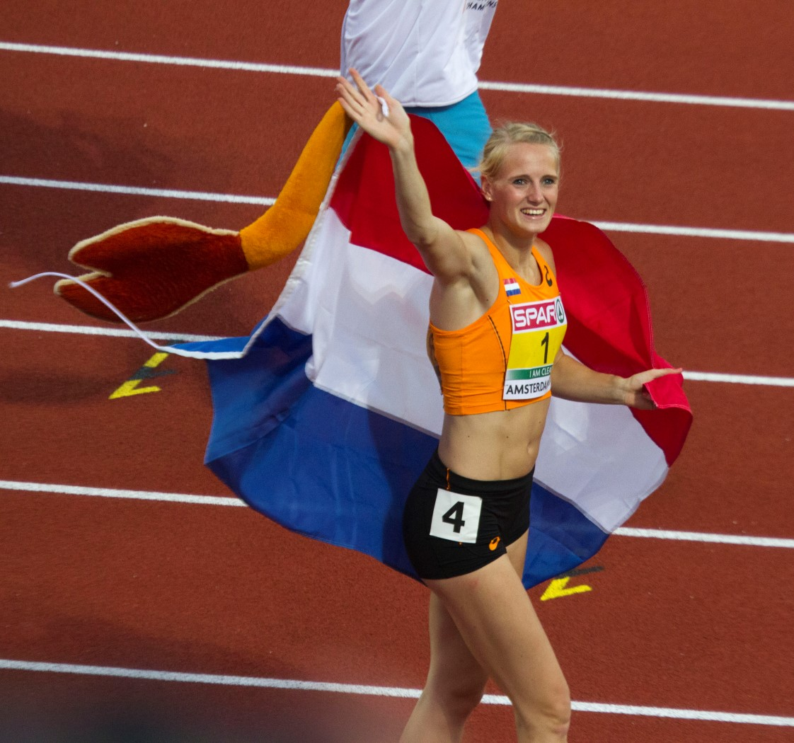 589 anouk vetter